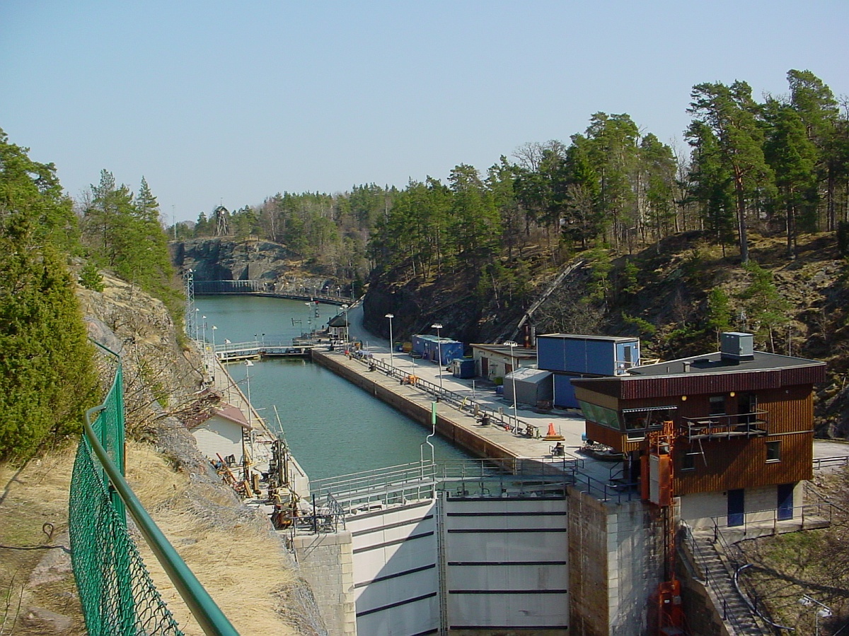 Neue Schleuse (1916) Trollhätte-Kanal (bei Trollhättan / Schweden)